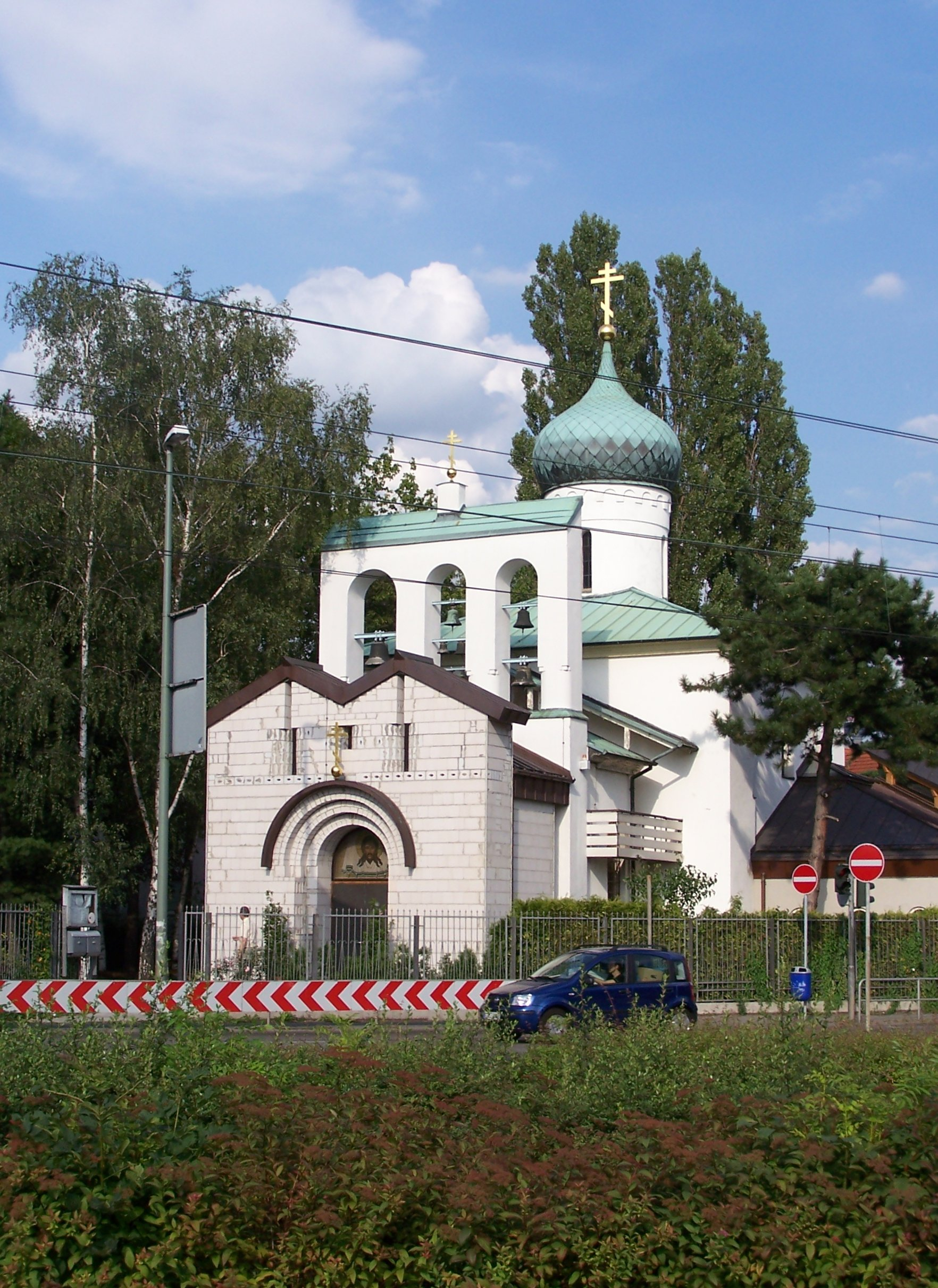 Russisch-orthodoxe Kirche Frankfurt-Hausen, Ludwig-Landmann-Straße